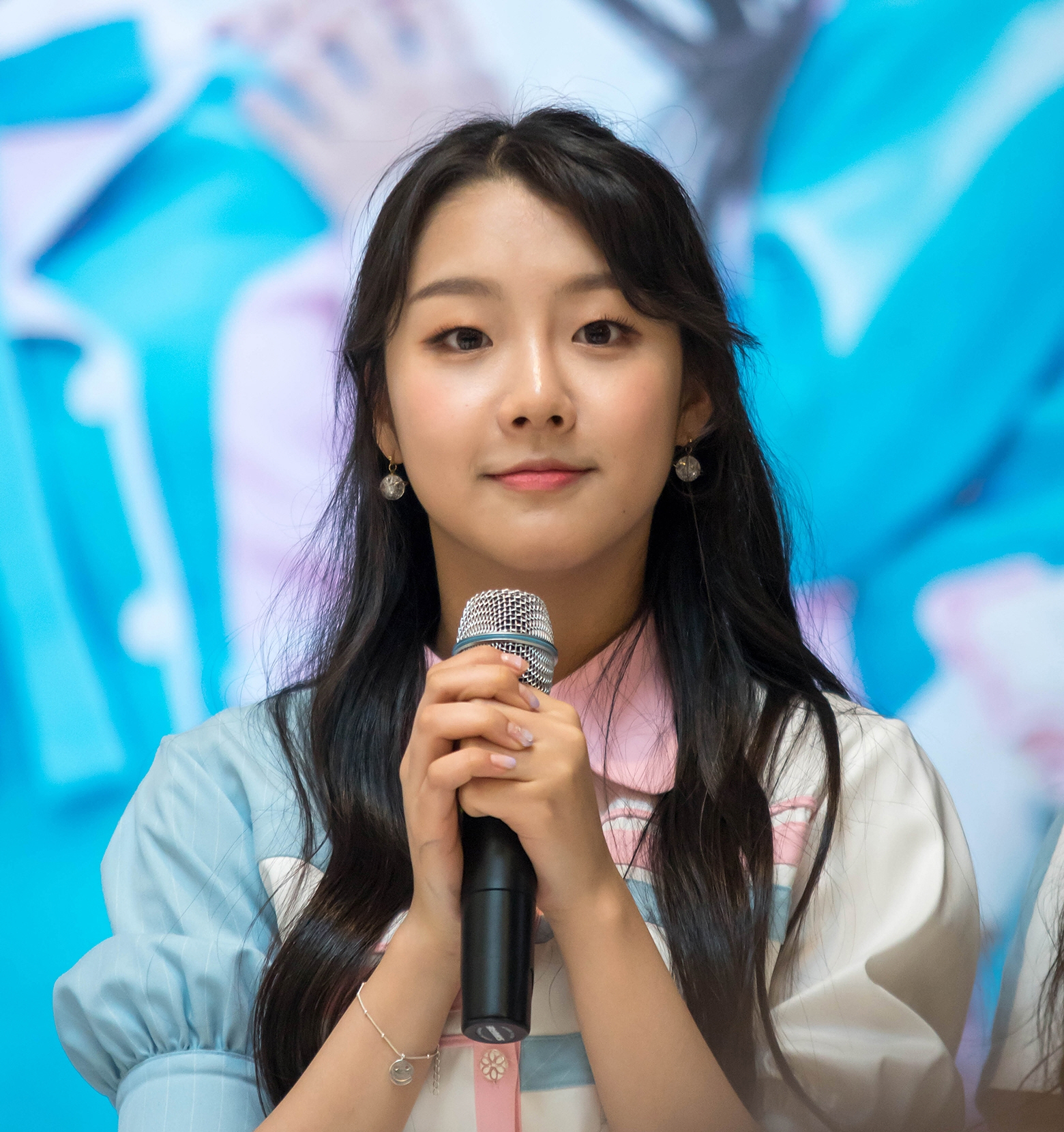 170624 엘리스 여의도 팬싸